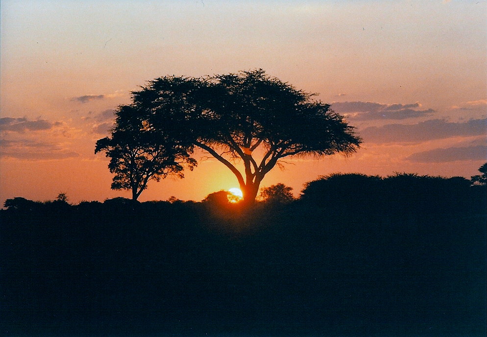 Sunset in Hwange National Park, Zimbabwe. Taken April 2005 on film.